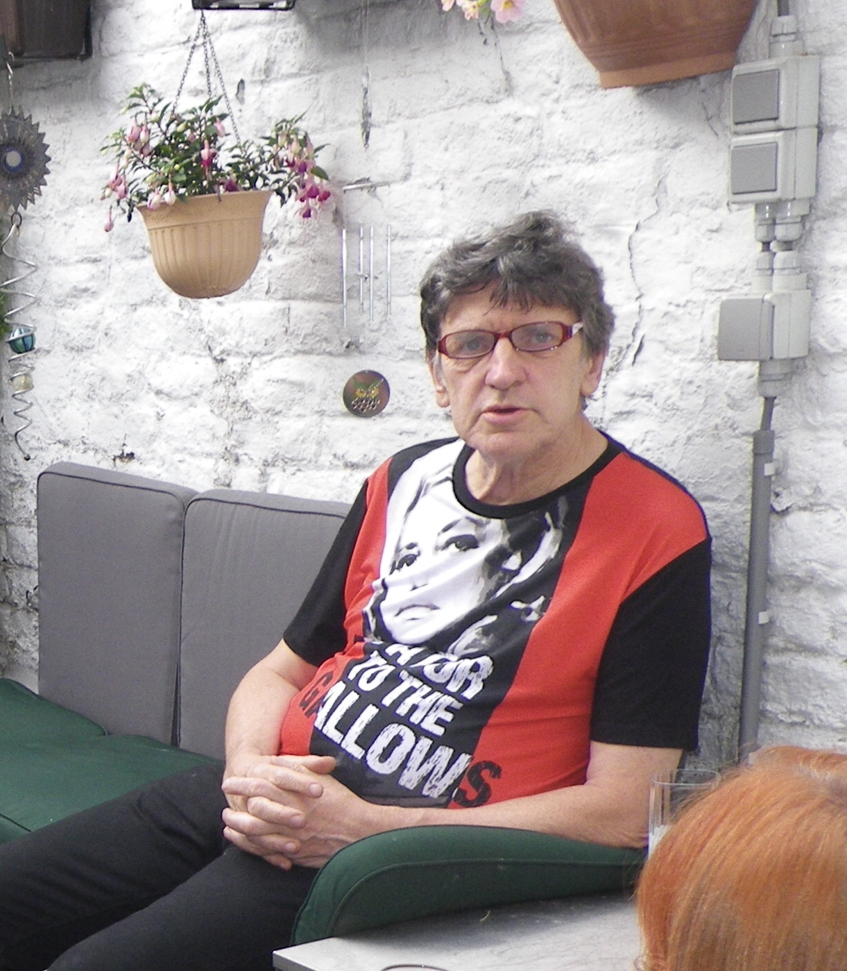 Stéphane Dupont assis sur le banc ans la cour, chez Luc V., lors de son anniversaire, 31-07-2017